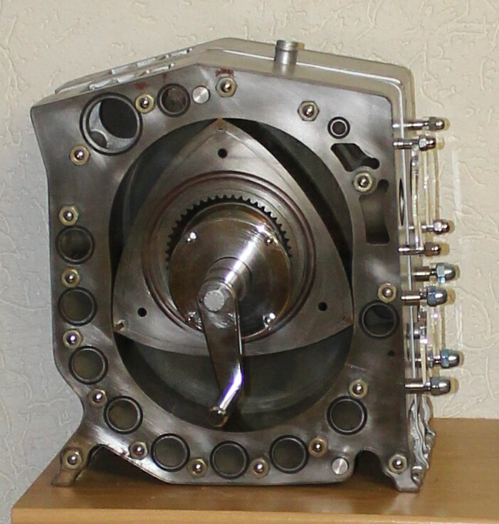 Funktionsmodell des Wielandmotors, Objekt von Werner Wieland